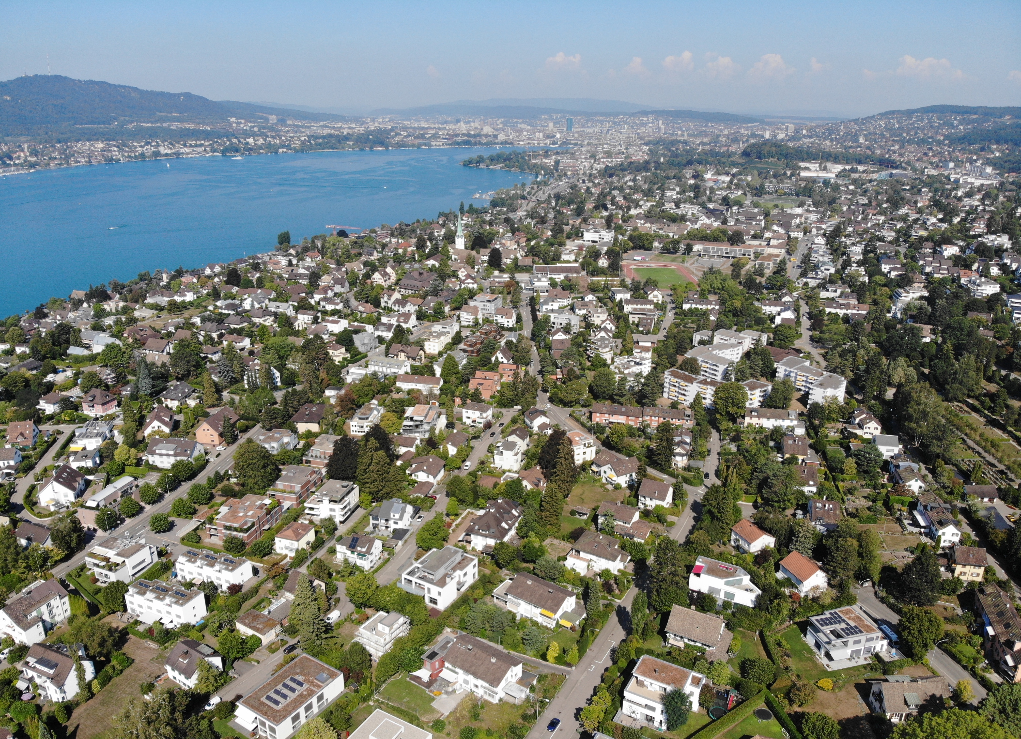 Zollikon Richtung Zürich